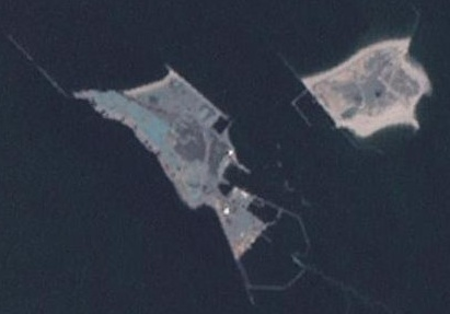 Heligoland, Landsat-7-Aufnahme der NASA aus World Wind